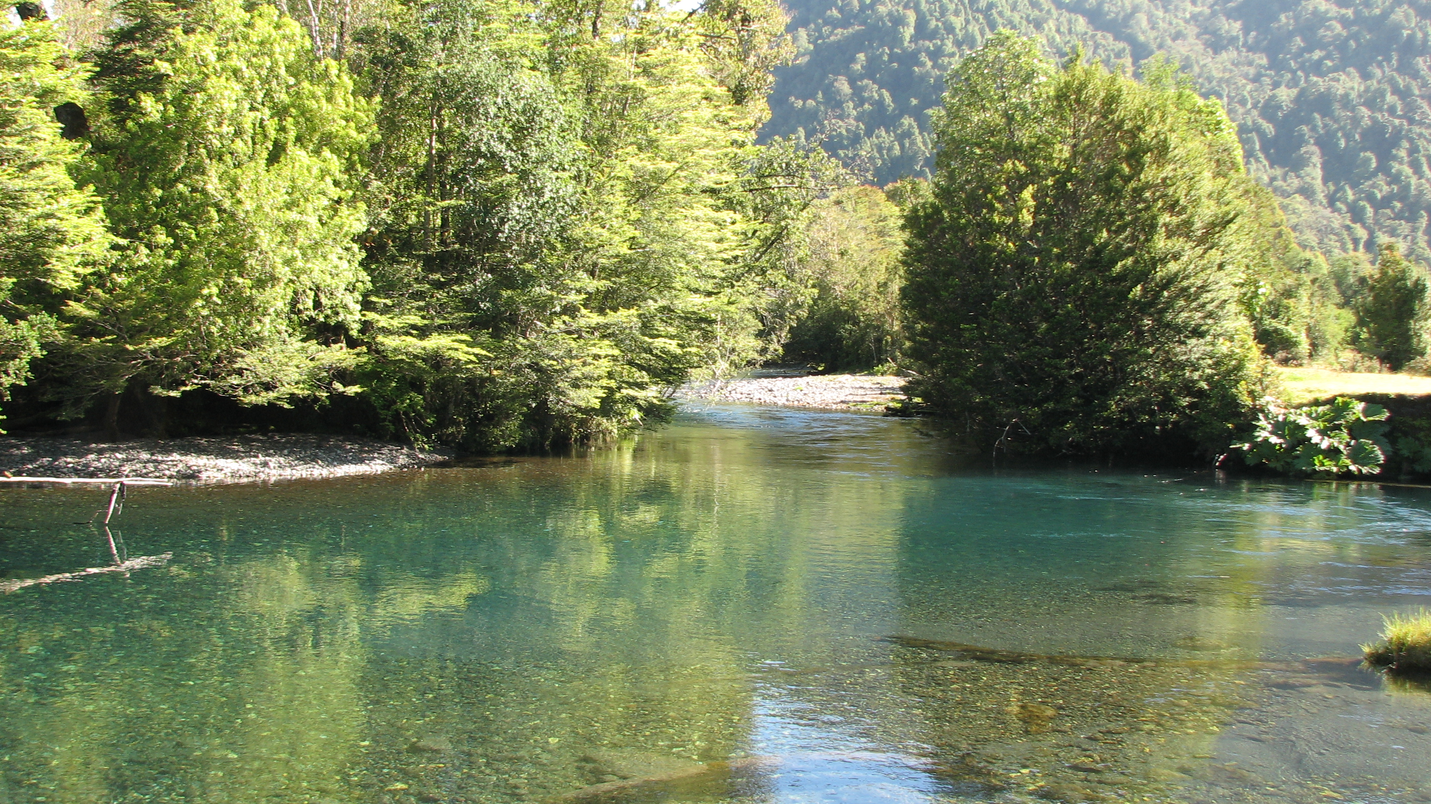 Hornopirén